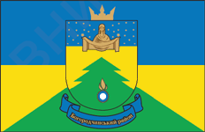 Прапор Богородчанського району